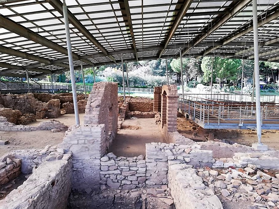 Interno